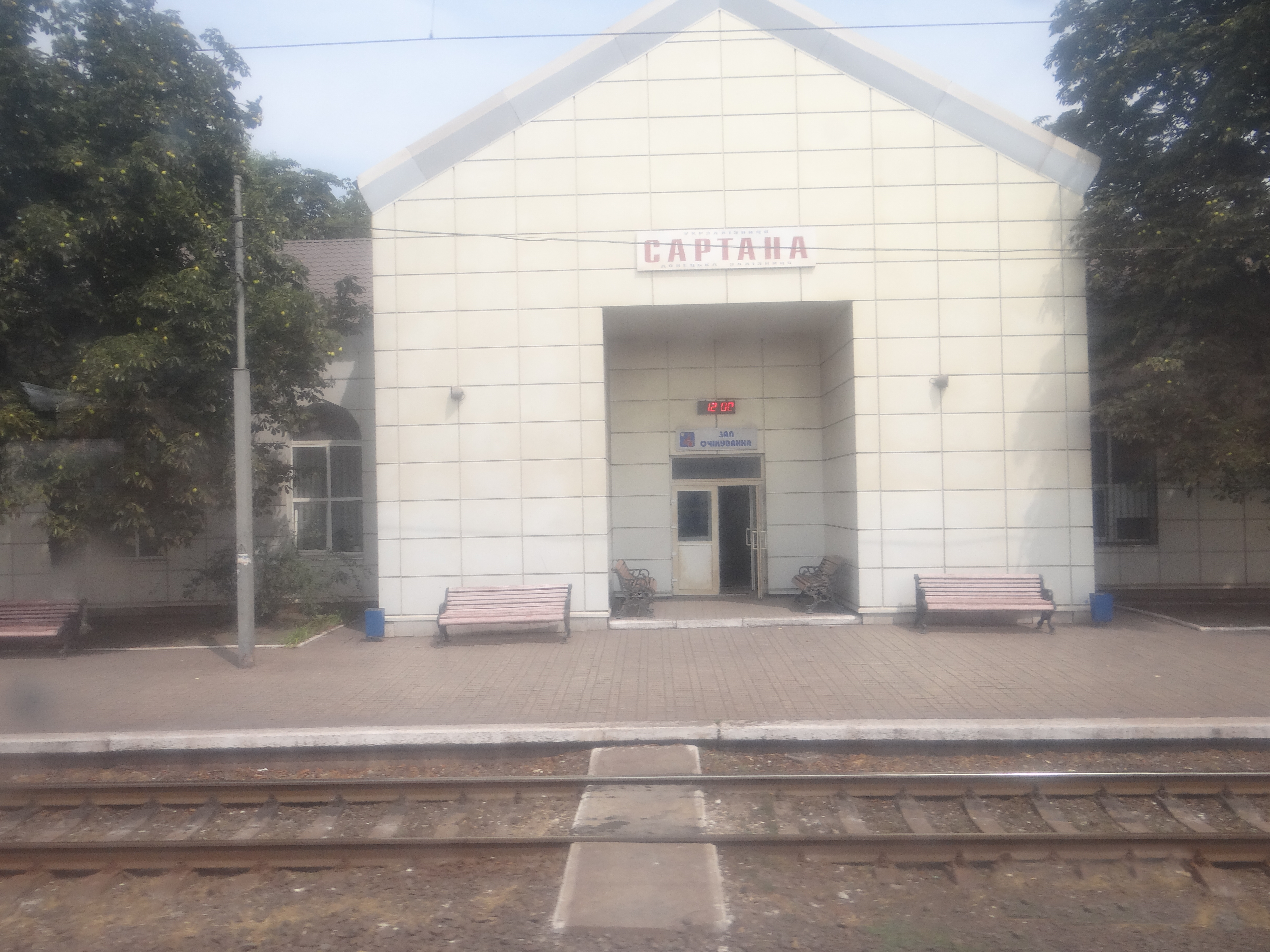 Станція Сартана